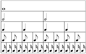 Valor relativo de las notas Proviene de FR